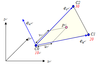 補間の概要図